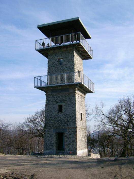 Česky: Erbenova vyhlídka v Ústí n. L.